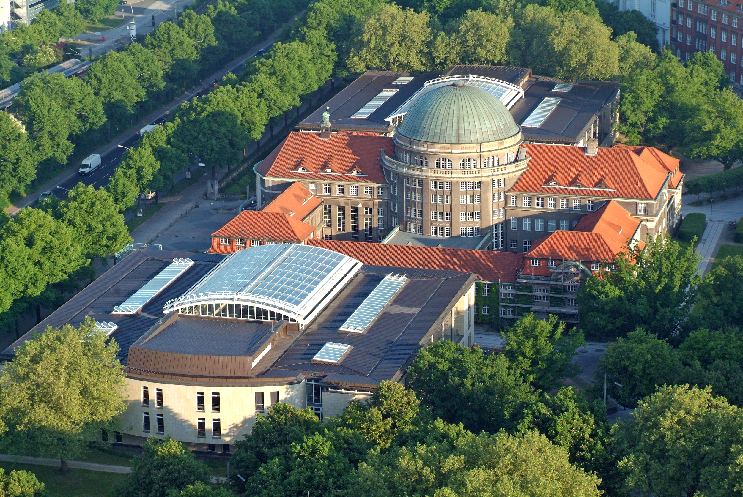 Universität Hamburg